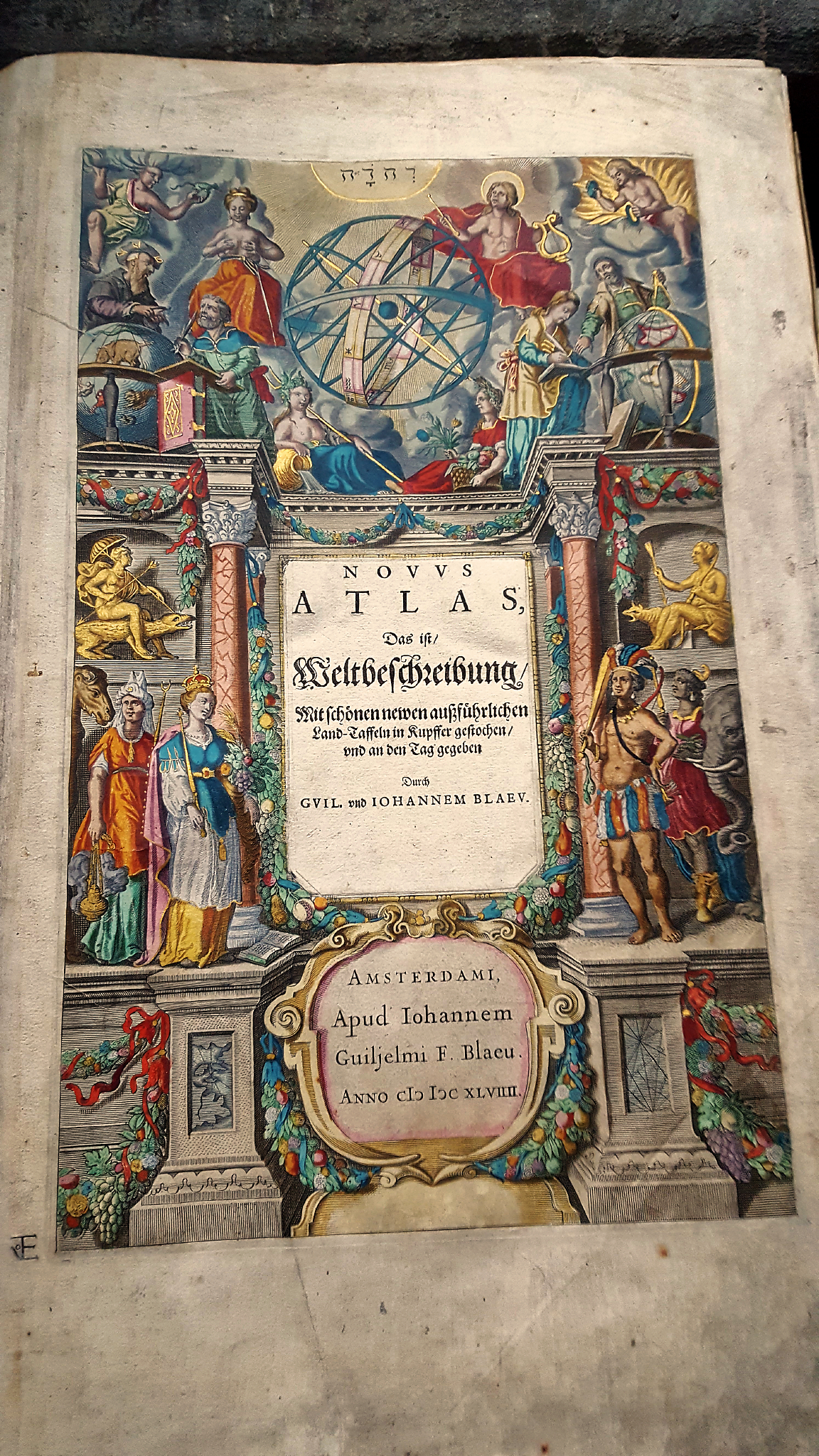 Der Atlas Blaeu bzw. Atlas Maior in der mittelalterlichen Predigerbücherei